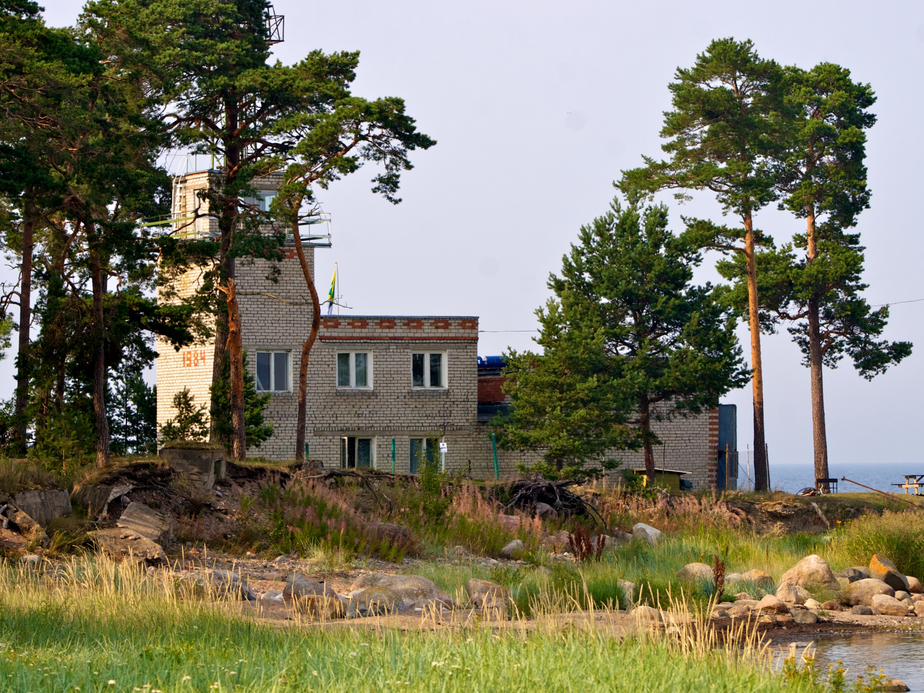 Vergi kordon.